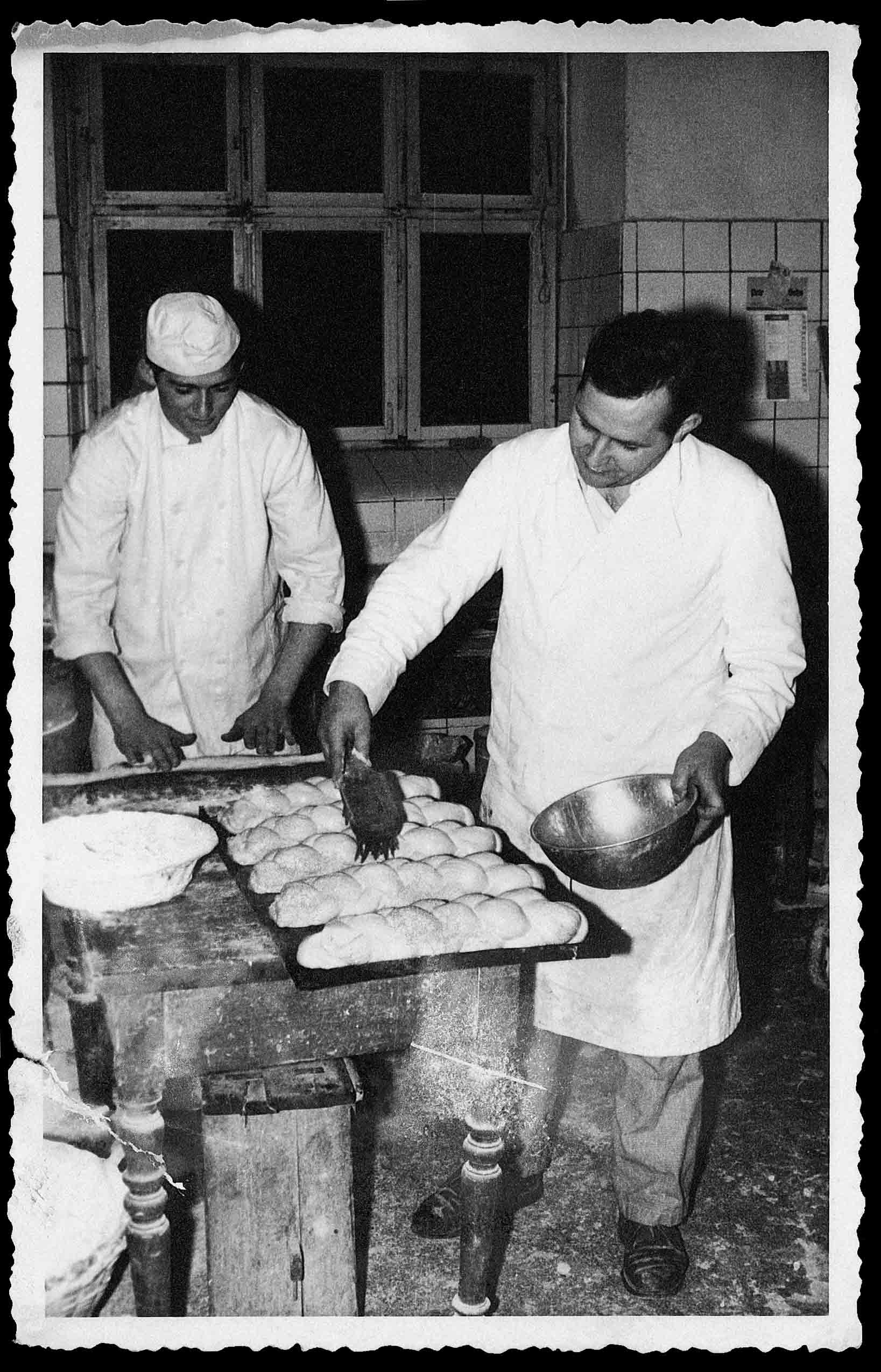 Ernst Wagner (1929-1999, vorn), Unternehmer und Gründer von Wagner Tiefkühlprodukte GmbH, heute Nestlé Wagner, in seinem Bäckereibetrieb